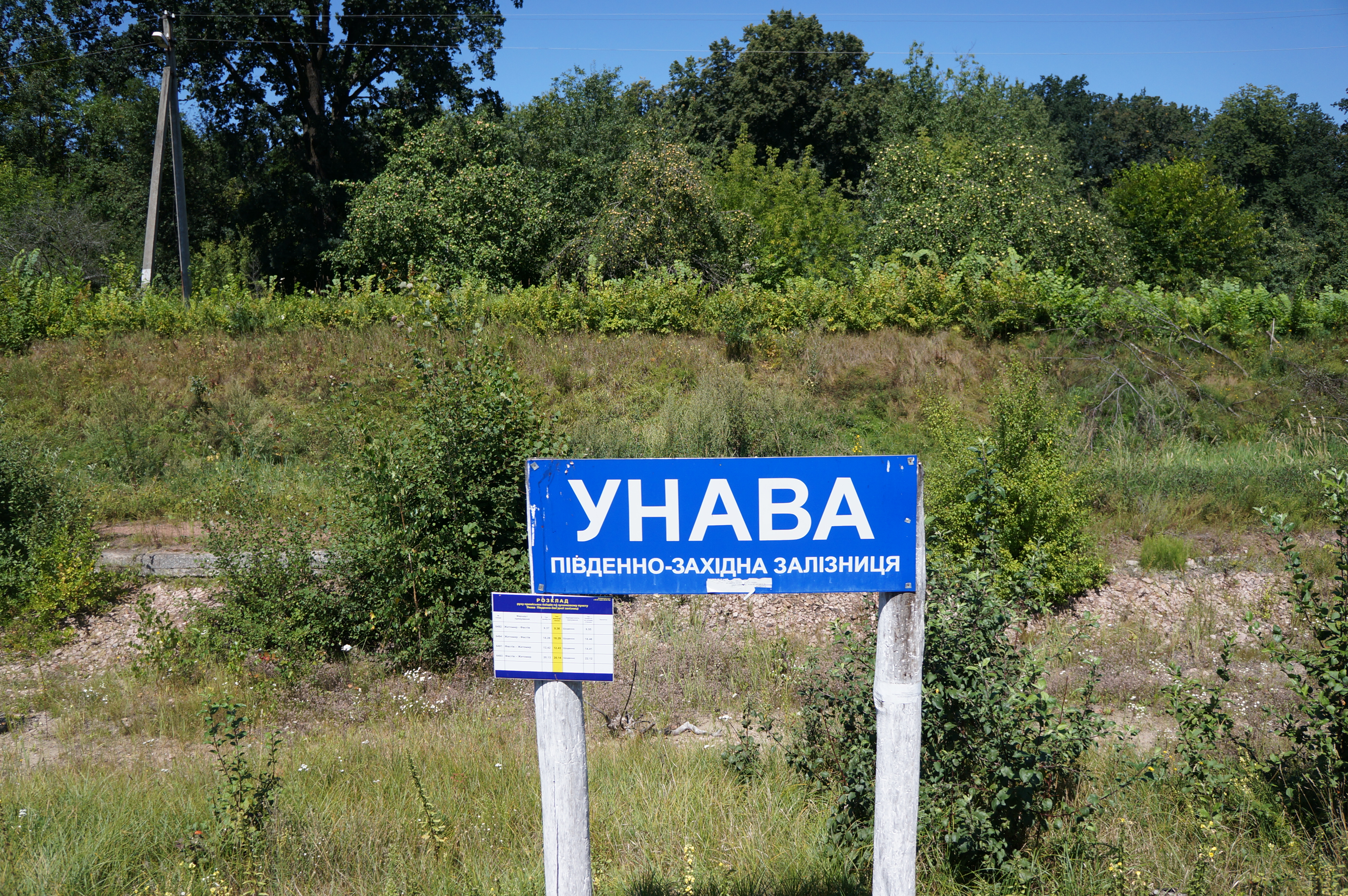 Залізнична платформа Унава